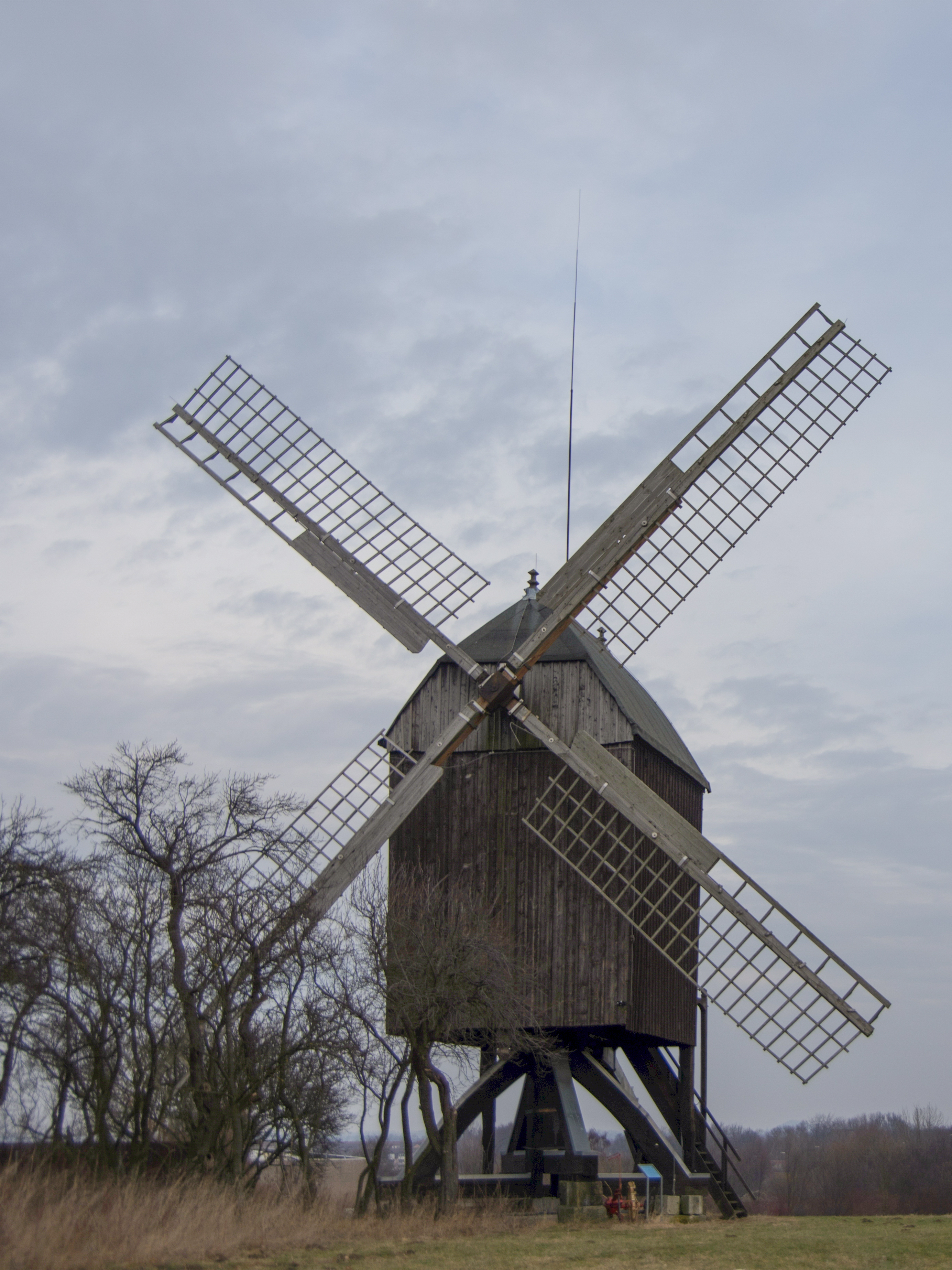 Salzgitter-Lichtenberg in Niedersachsen.